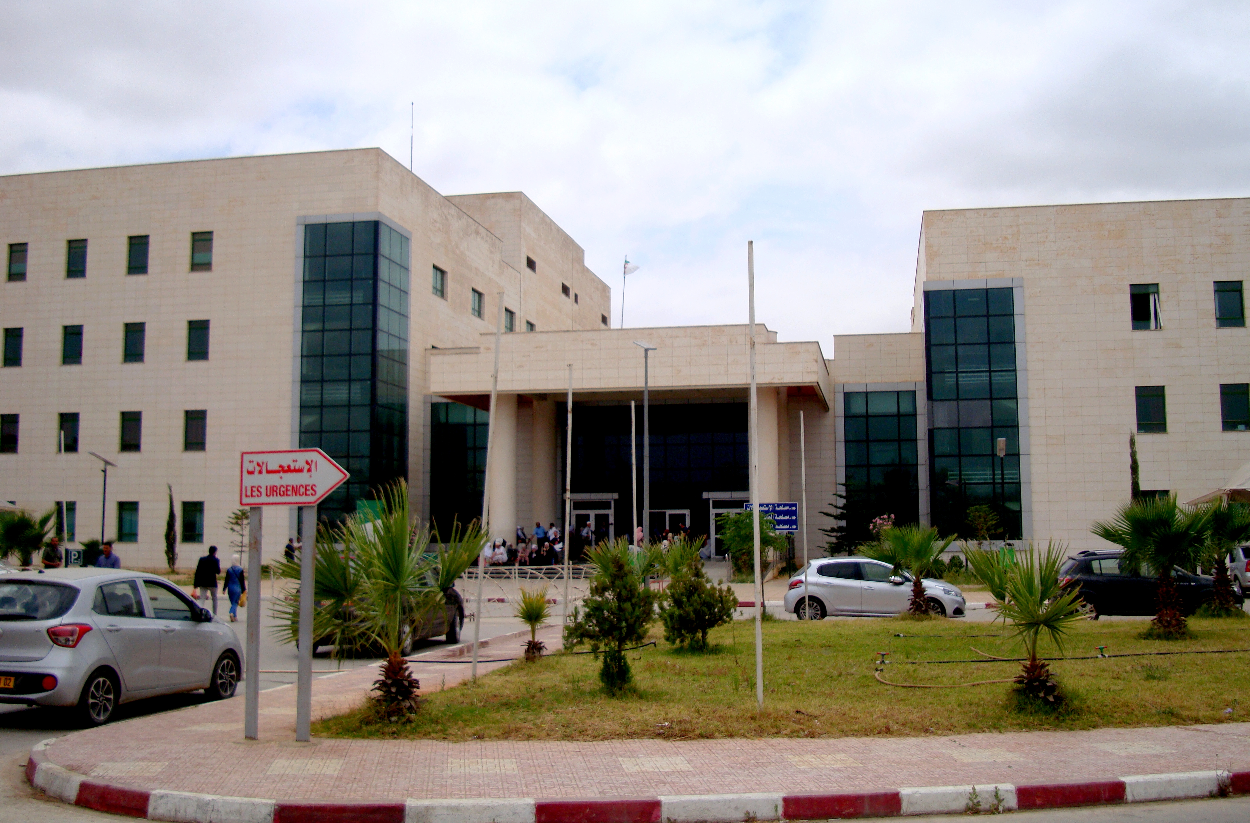 Entrée principale Hôpital Sœurs Bedj à Chlef